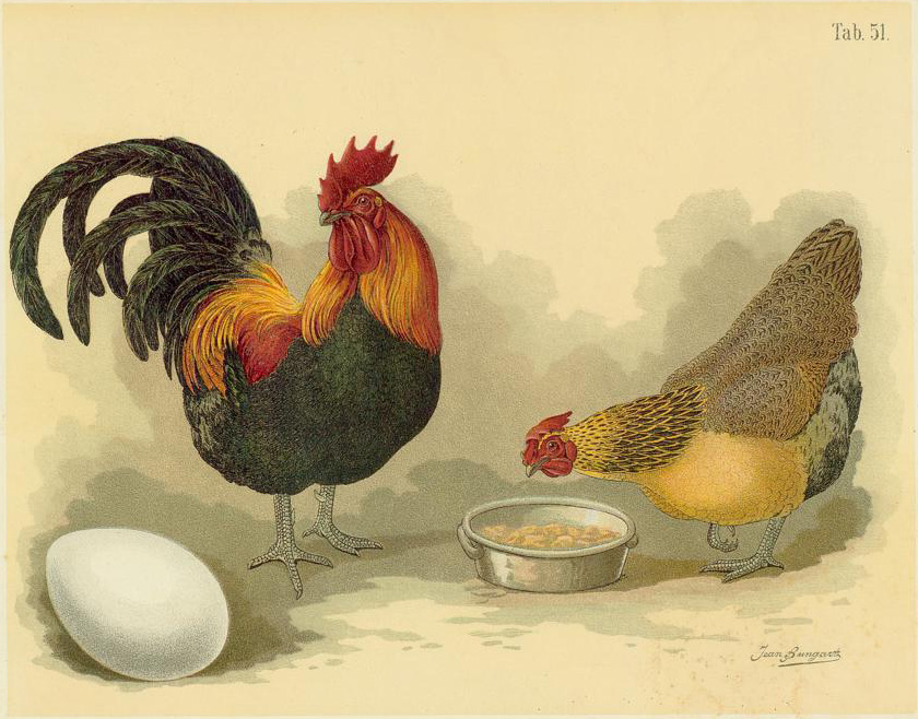 Dachs-Huhn. Gallus dom. brevipes. Dumpies. Courses-pattes.